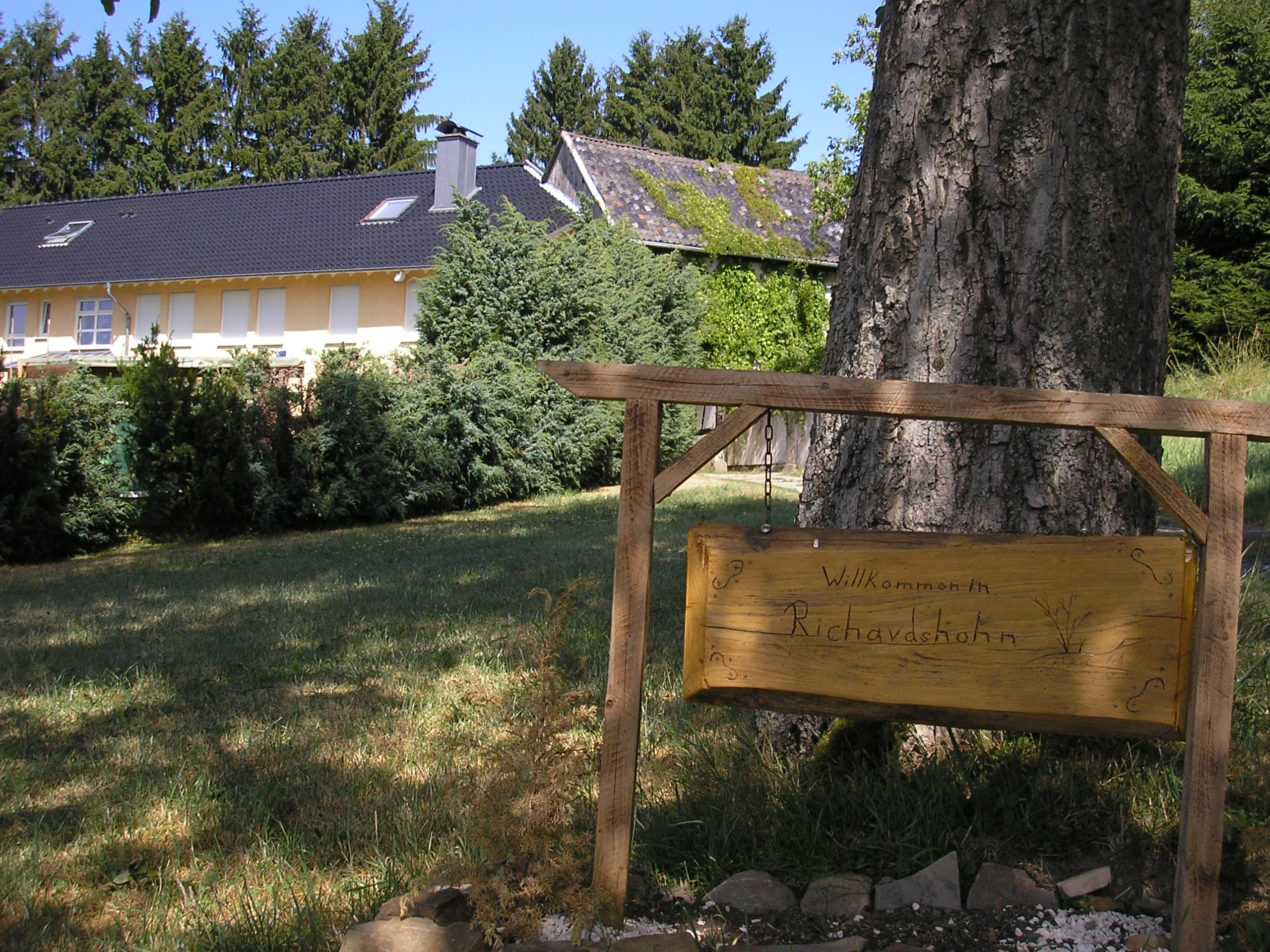 Richardshohn, Hofeinfahrt